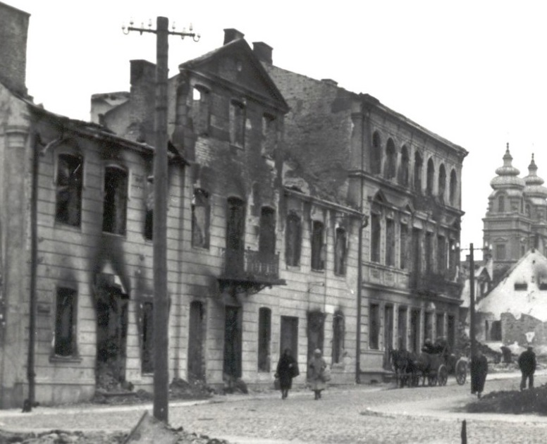 Oba budynki zniszczone podczas działań wojennych zostały rozebrane w 1940 roku. Duży murowany dom przy ul. Działdowskiej 9 został zbudowany na początku XIX wieku